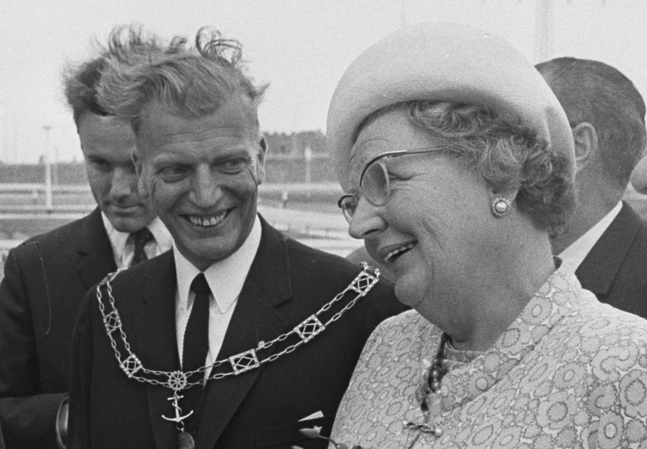 Bij aankomst krijgt koningin Juliana bloemen aangeboden door familie Wijshoff (links), mr. J. Onland (burgemeester)